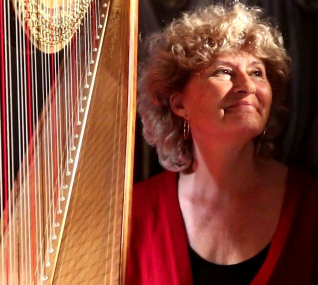 Marielle Nordmann, harpiste